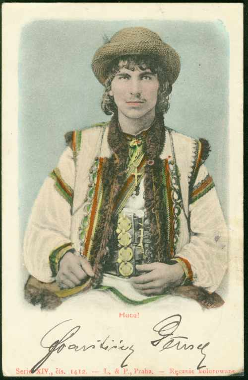 Гуцули: Гуцули